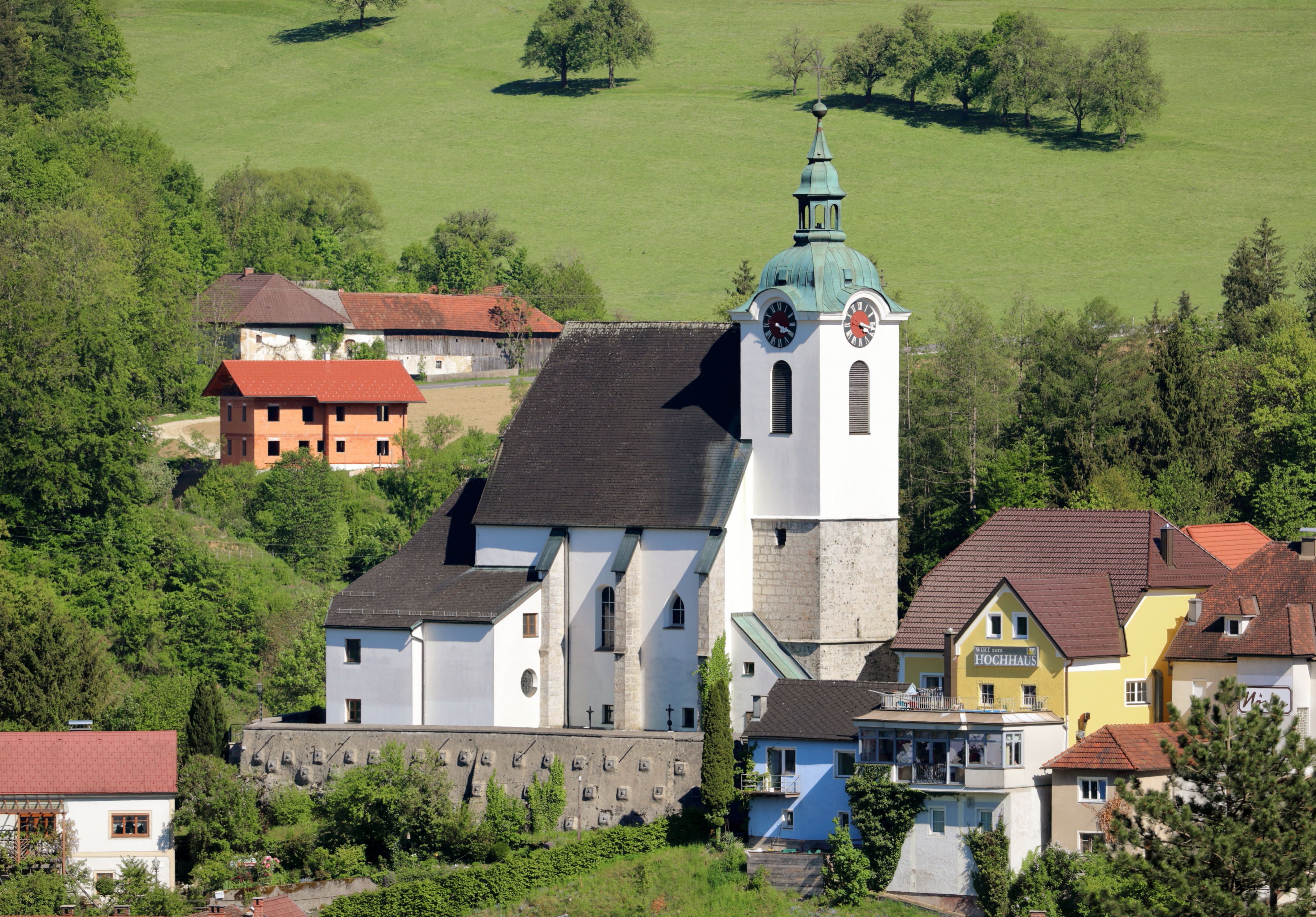 Westansicht der röm.-kath. Pfarrkirche hl. Bartholomäus in der oberösterreichischen Gemeinde Steinbach an der Steyr.